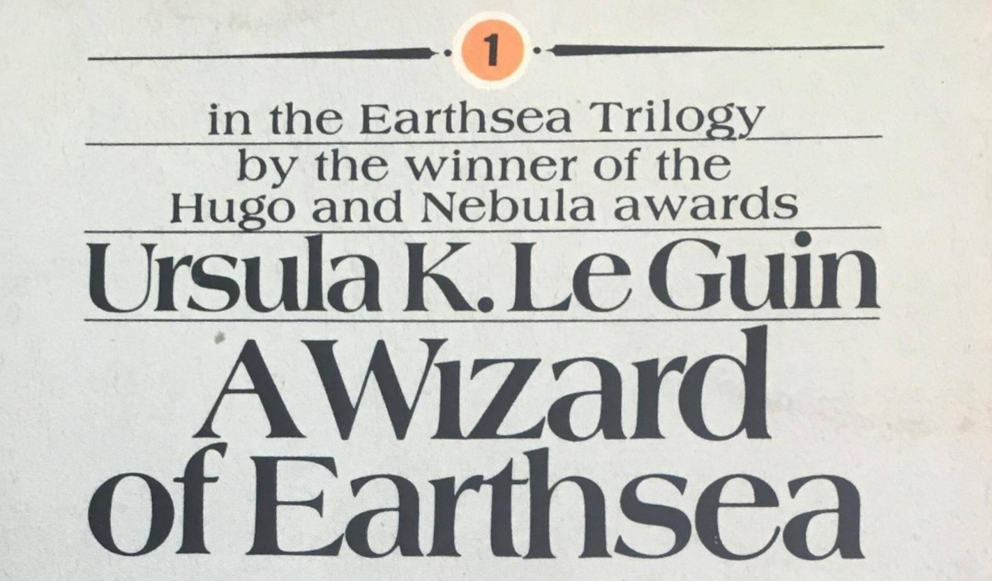 Page de garde de A Wizard of Earthsea dans l'édition de poche parue aux USA. J'ai pris garde à ne pas faire apparaître de dessin, logo, pictogramme ou autre qui serait protégé par le droit d'auteur.